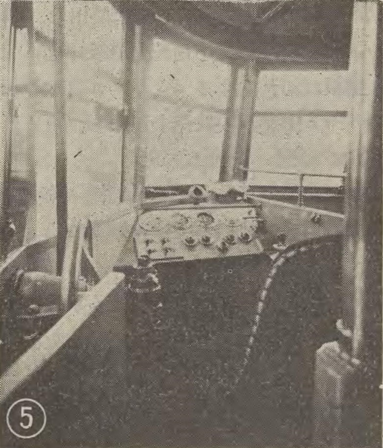 キハ43000形気動車の運転台。